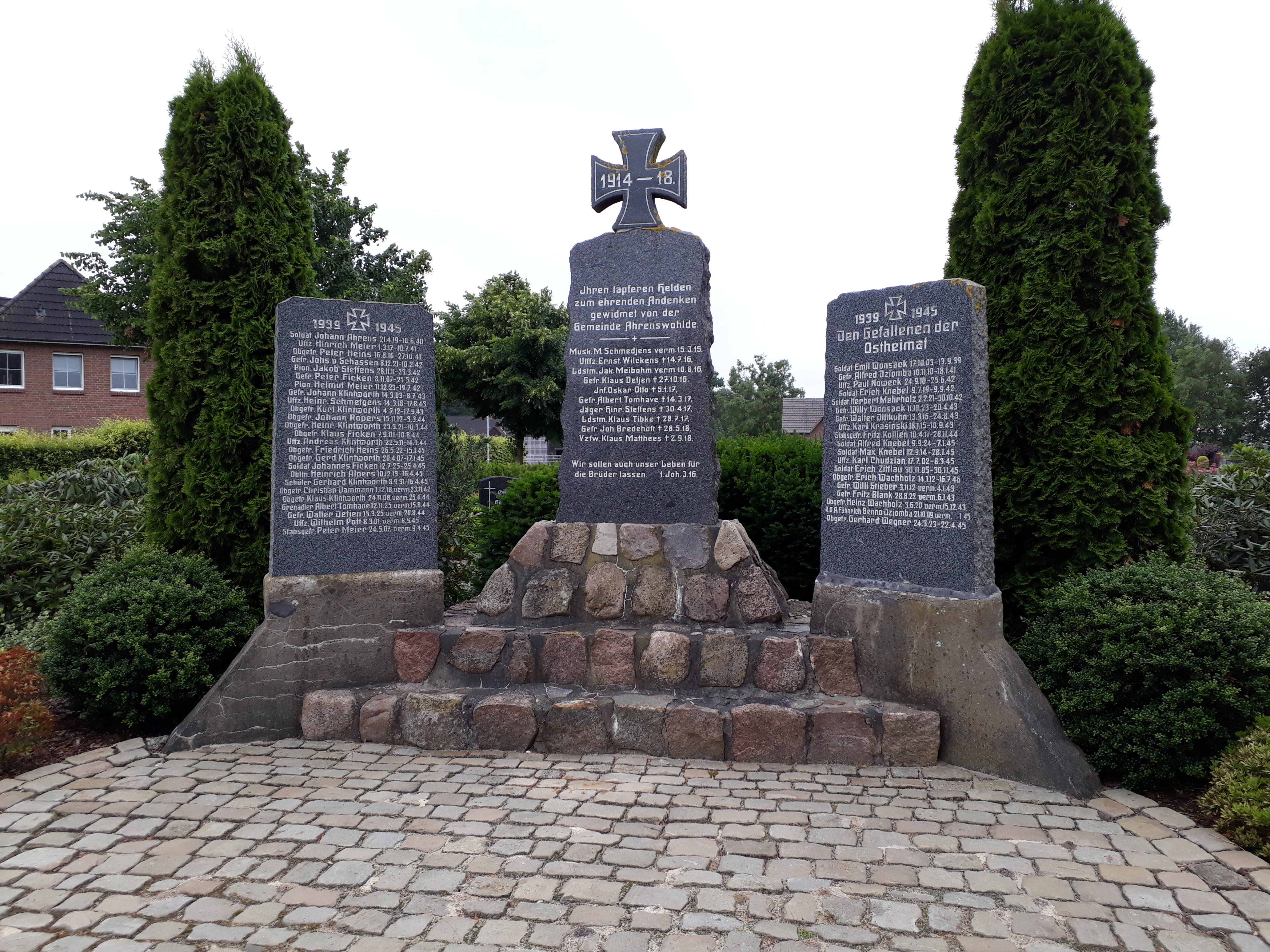 Kriegerdenkmal (1. und 2. Weltkrieg, Gefallene der Ostheimat) in Ahrenswohlde auf dem Friedhof.